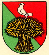 Wappen von Hermenches Kanton Waadt Schweiz